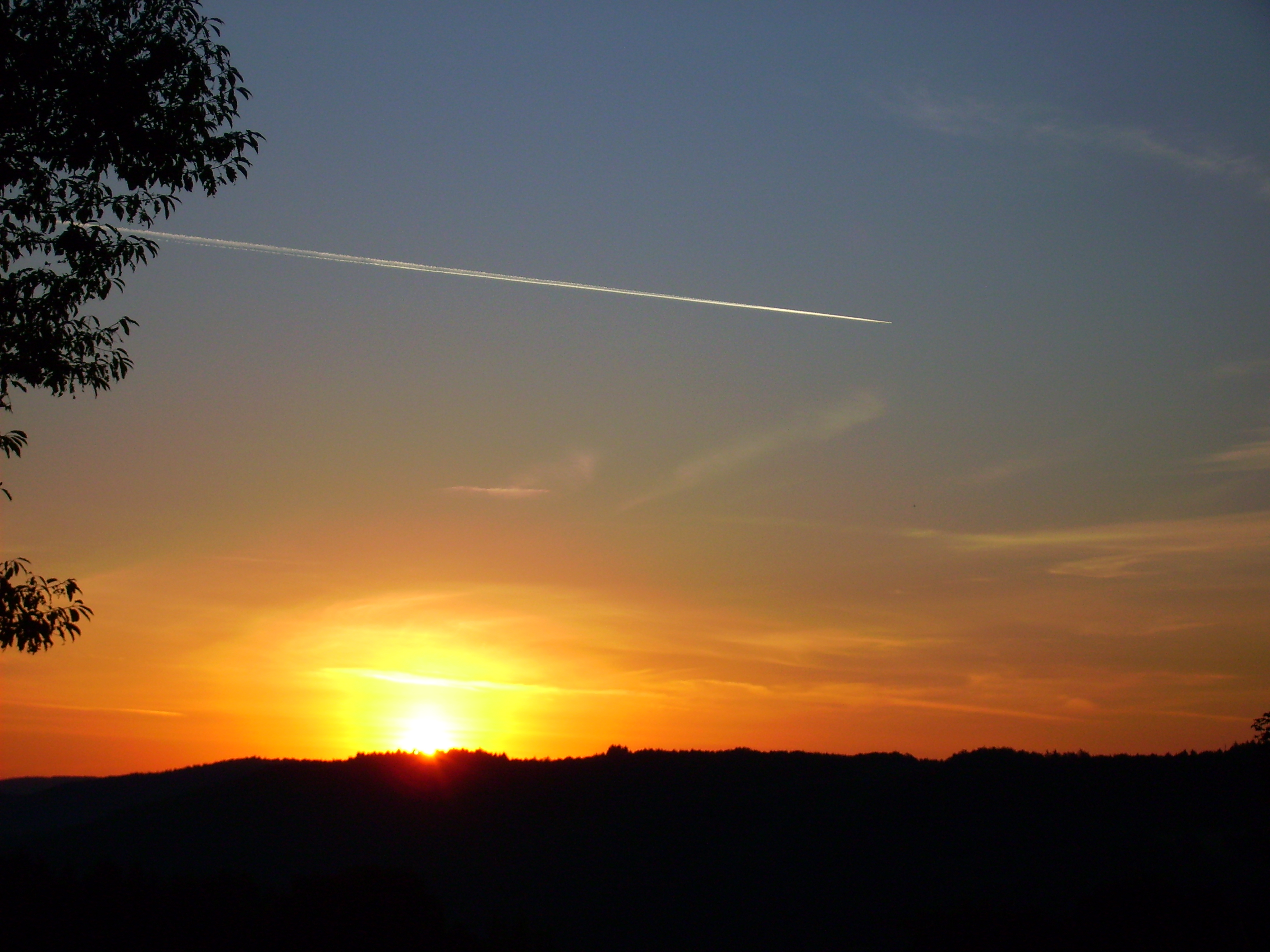 Sonnenaufgang in Windeck (Nordrhein-Westfalen).